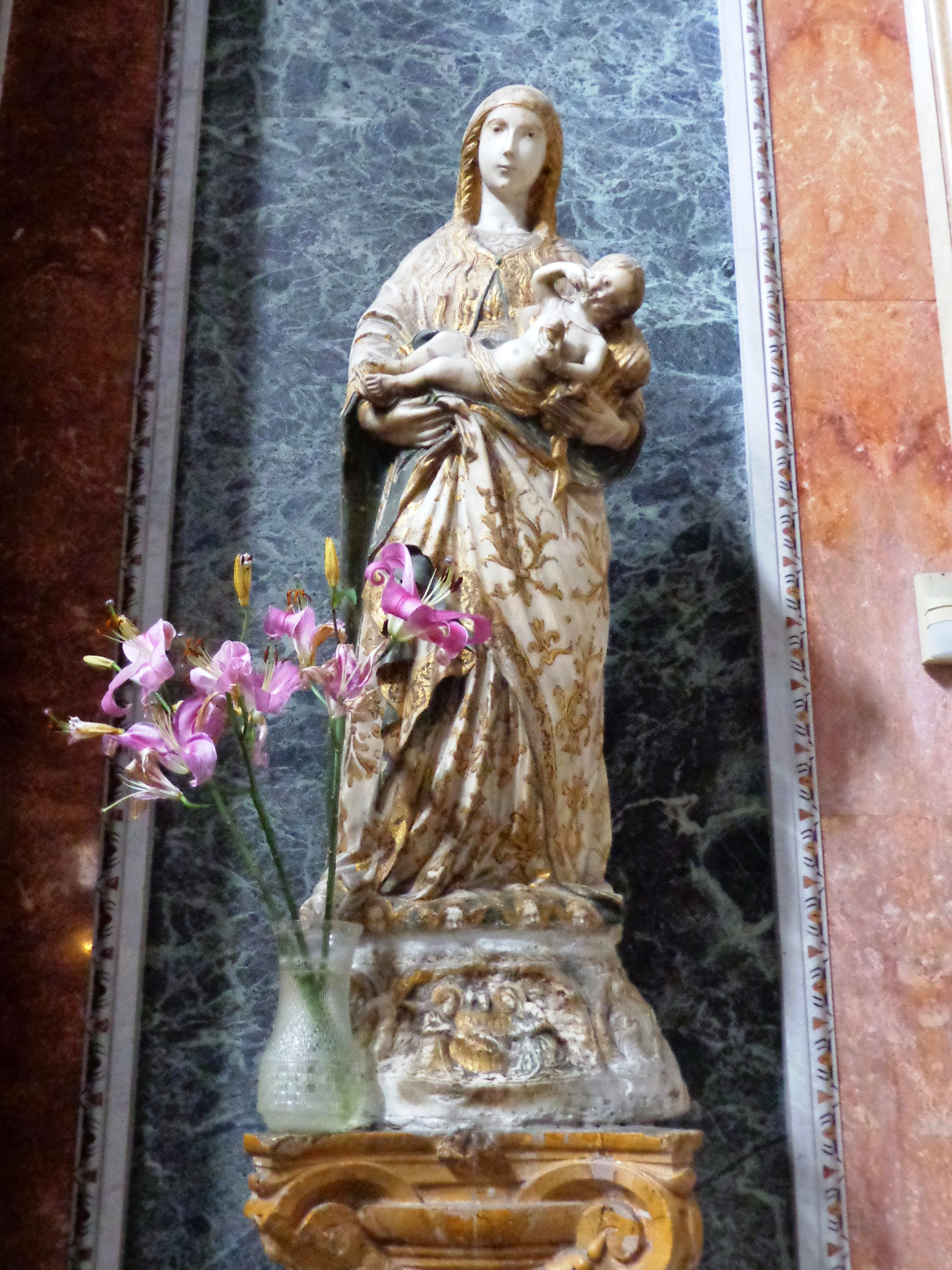 Teatini_Pa_02